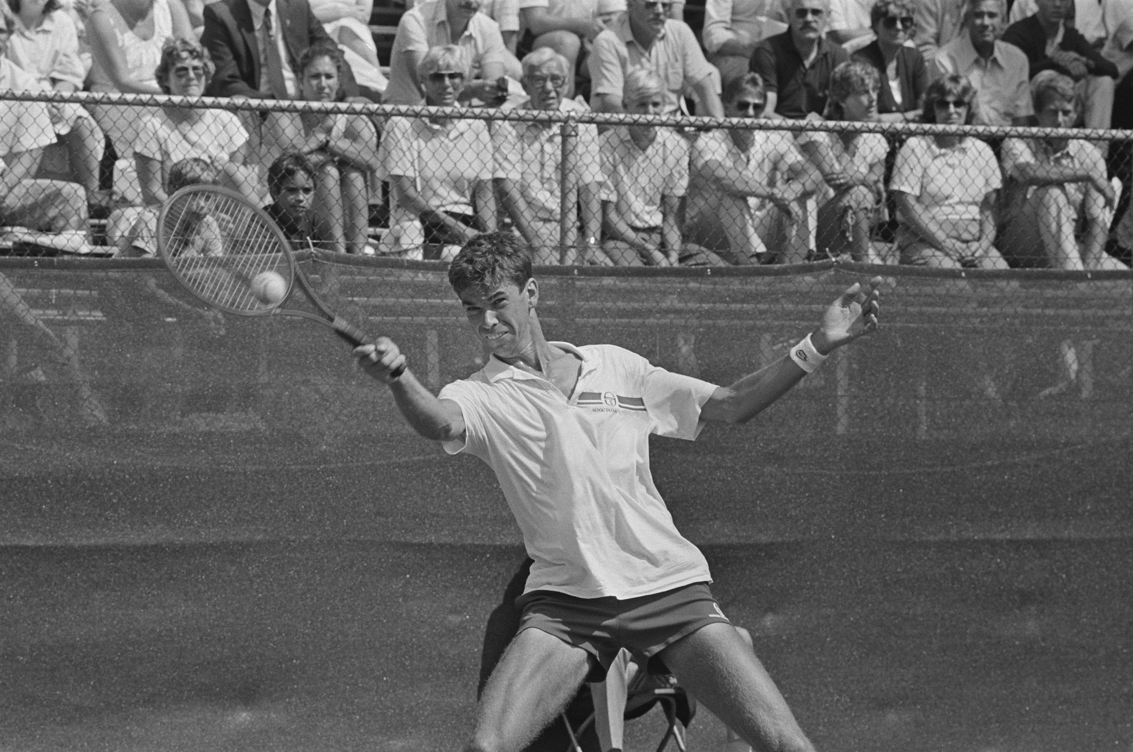 Collectie / Archief : Fotocollectie Anefo Reportage / Serie : [ onbekend ] Beschrijving : Internationaal tennis op Melkhuisje in Hilversum; Michiel Schapers in actie Datum : 24 juli 1985 Locatie : Hilversum Trefwoorden : TENNIS Persoonsnaam : Schapers, Michiel Instellingsnaam : Melkhuisje, 't Fotograaf : Bogaerts, Rob / Anefo Auteursrechthebbende : Nationaal Archief Materiaalsoort : Negatief (zwart/wit) Nummer archiefinventaris : bekijk toegang 2.24.01.05 Bestanddeelnummer : 933-3837